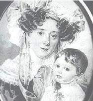 Александра Павловна Сумарокова, ур. Маруцци (1790—1857)